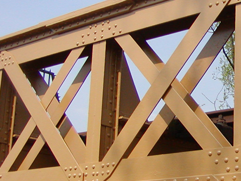 Detail Moerputtenbrug na de restauratie